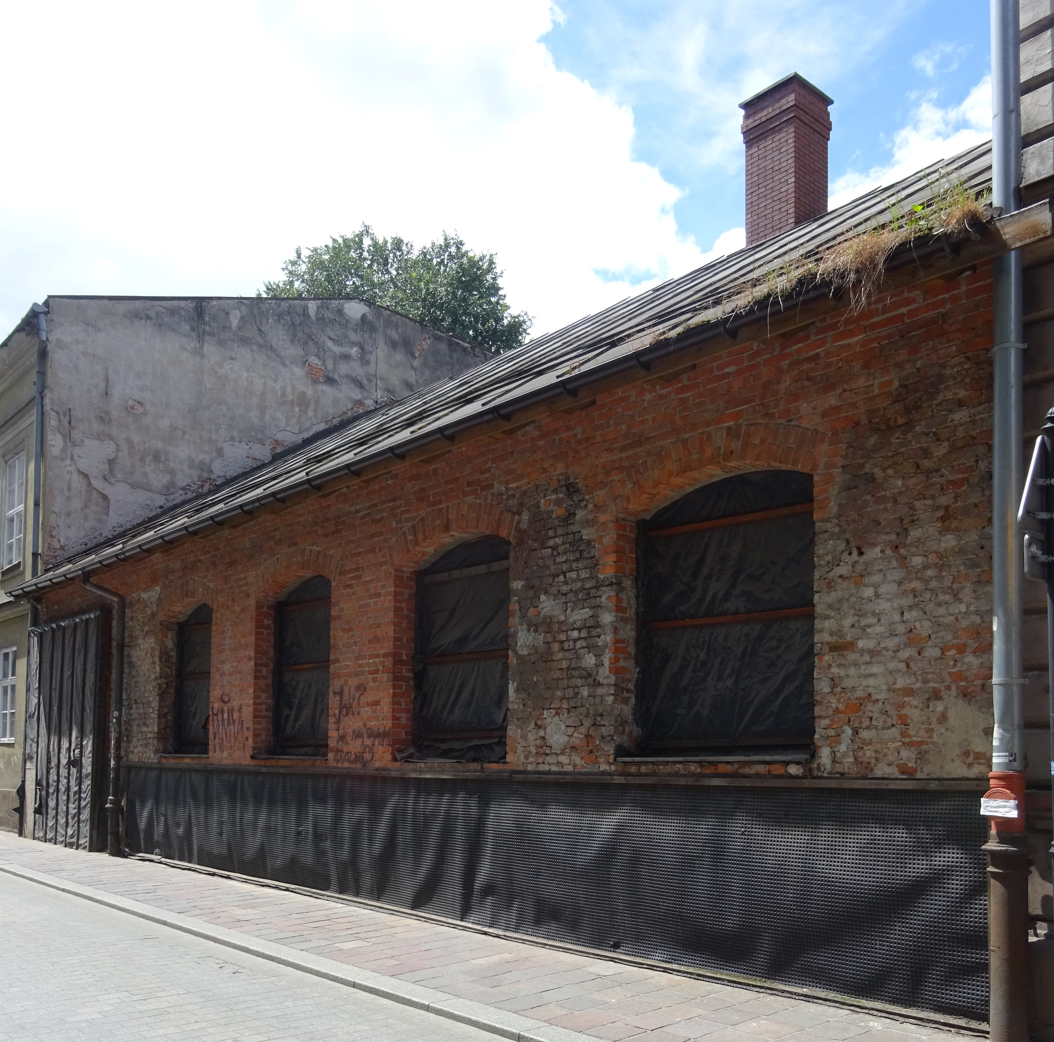 Kuźnia Zieleniewskich w Krakowie przy ul. św. Krzyża 16. Obiekt nr 5 na Krakowskim Szlaku Techniki, stan w 2018 roku po częściowej odbudowie fasady, która runęła w 2009 roku.